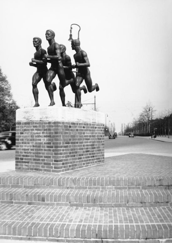 Berlin Reichssportfeld Information added by Wikimedia users.Ergänzende Bildbeschreibung: Läufergruppe des Bildhauers Hugo Lederer von 1928 (1943 eingeschmolzen). Ehemaliger Standort: Scholzplatz an der Heerstraße.